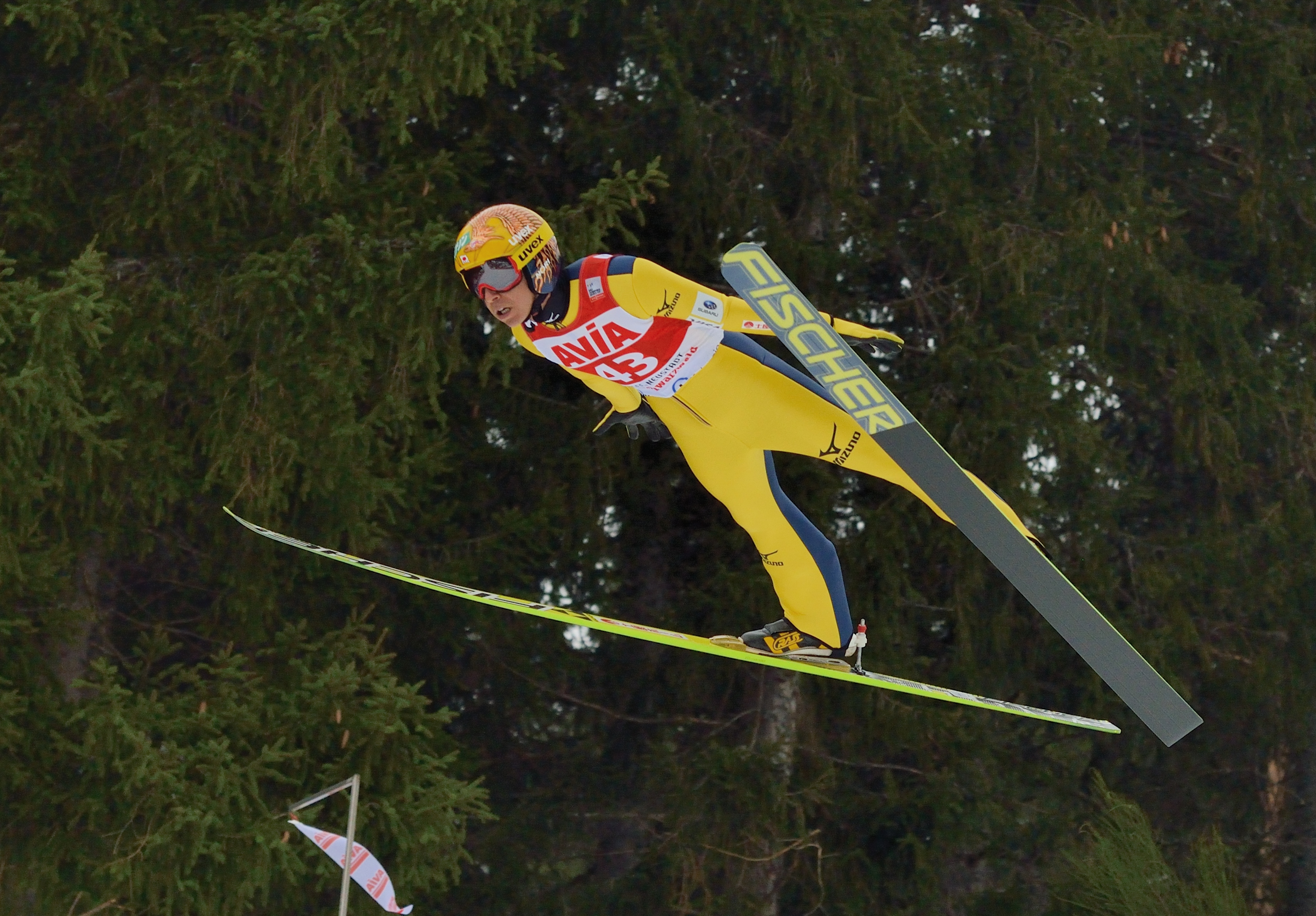 FIS Ski Weltcup Titisee-Neustadt 2016: Noriaki Kasai